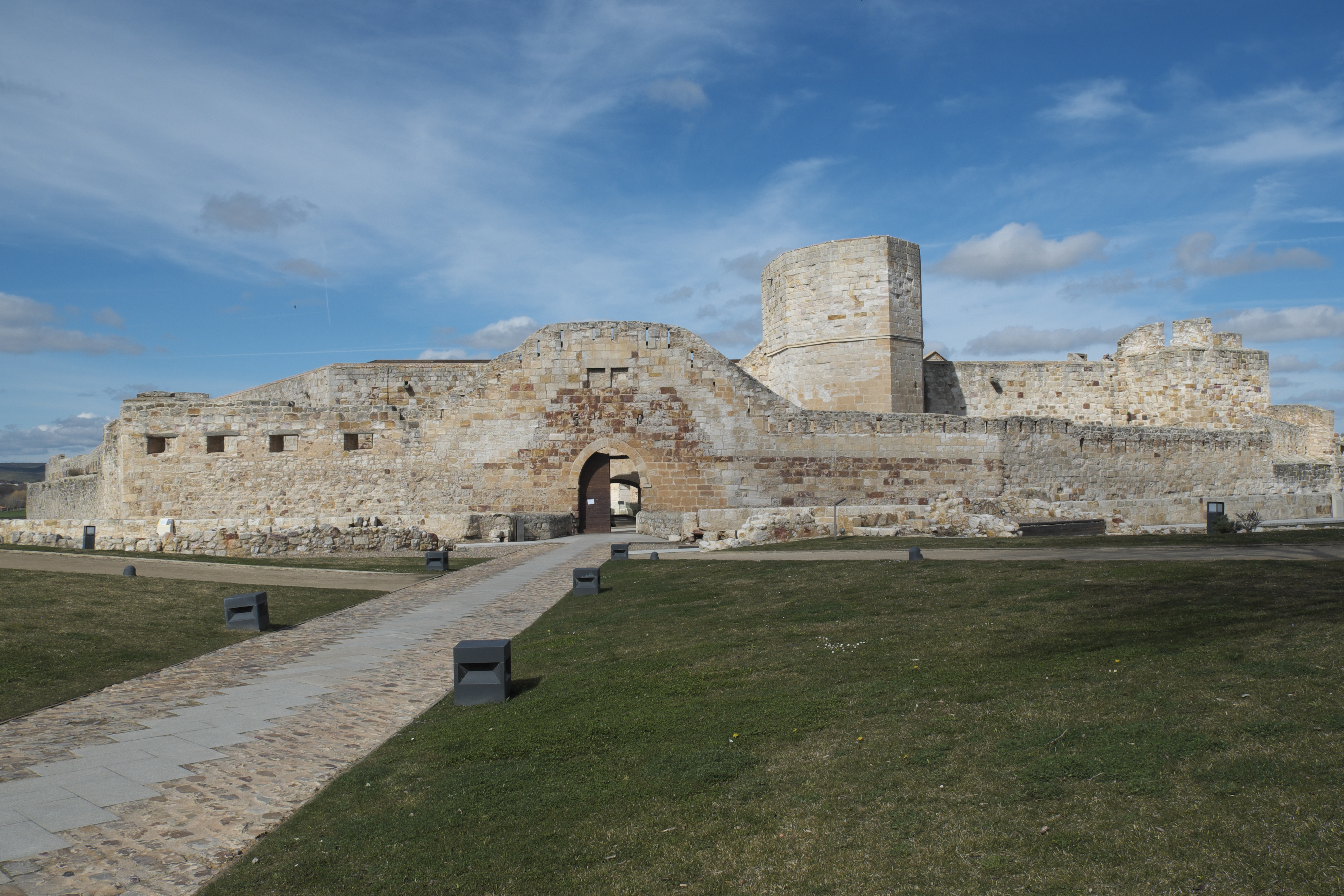 Burg von Zamora (Kastilien-León/Spanien)